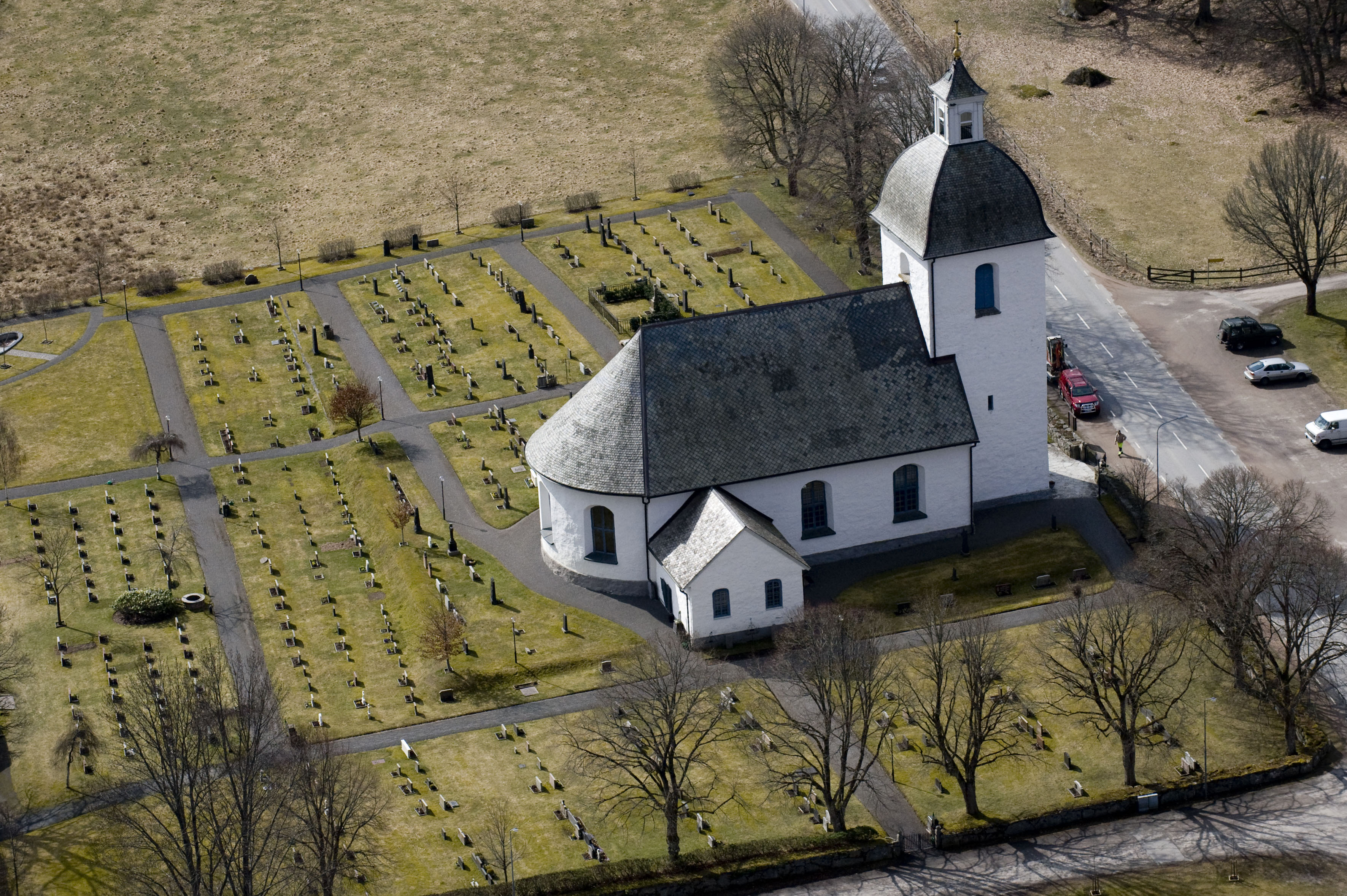 Gällaryds ka